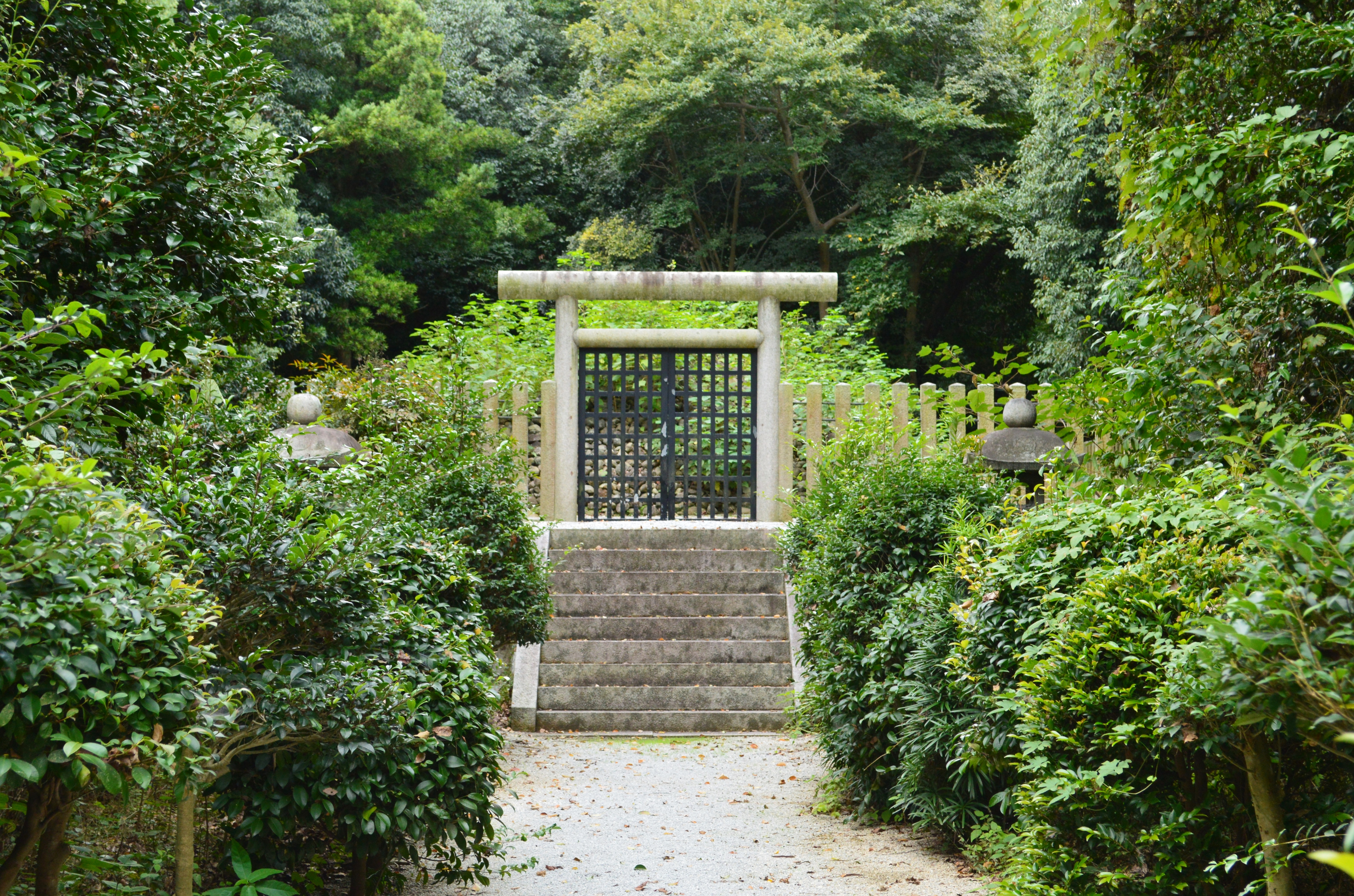 神櫛王墓 拝所